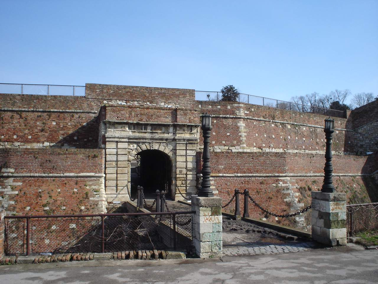 Kings gate,Belgrade fortress.